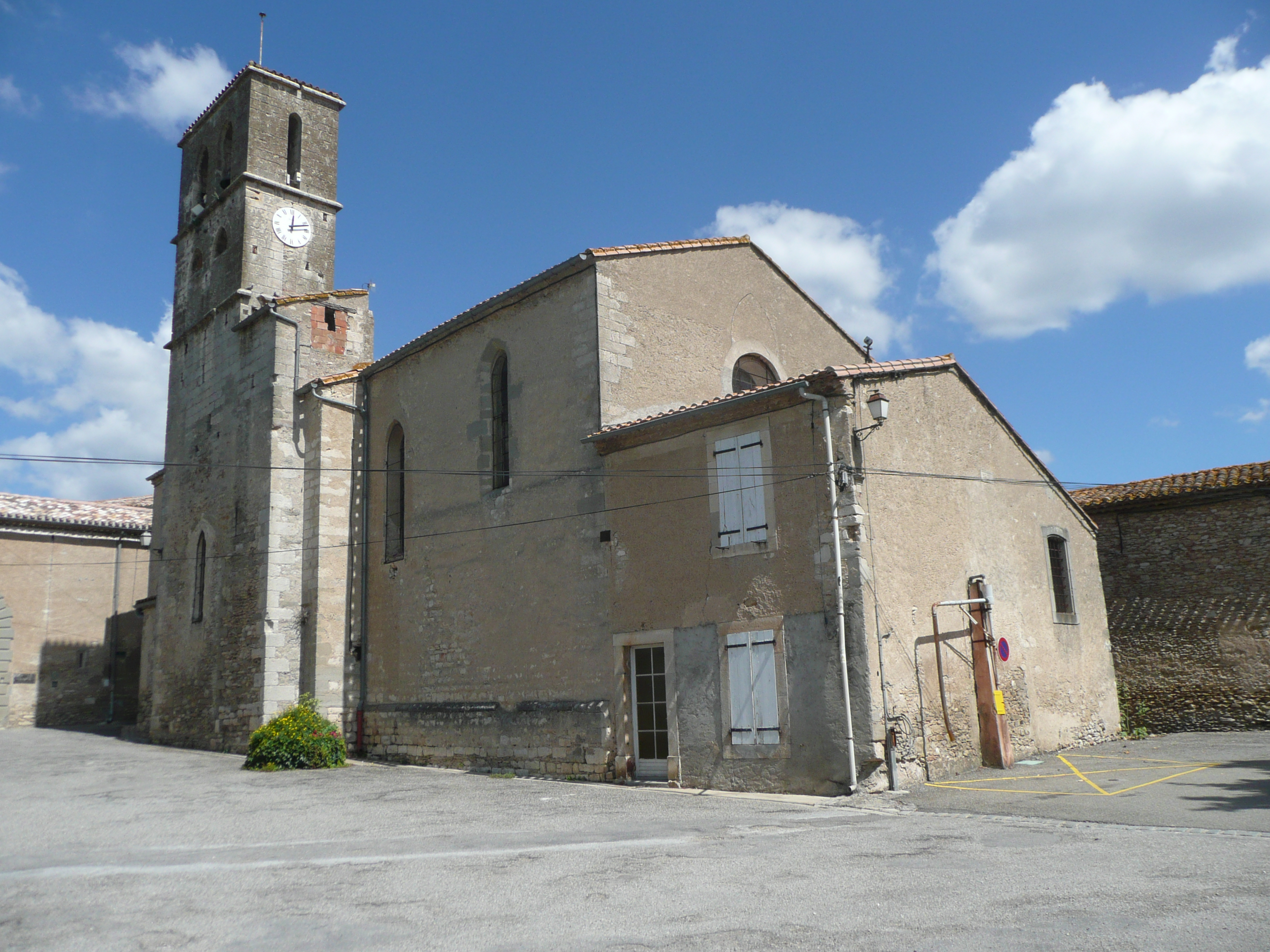 Église de Moussoulens (France).